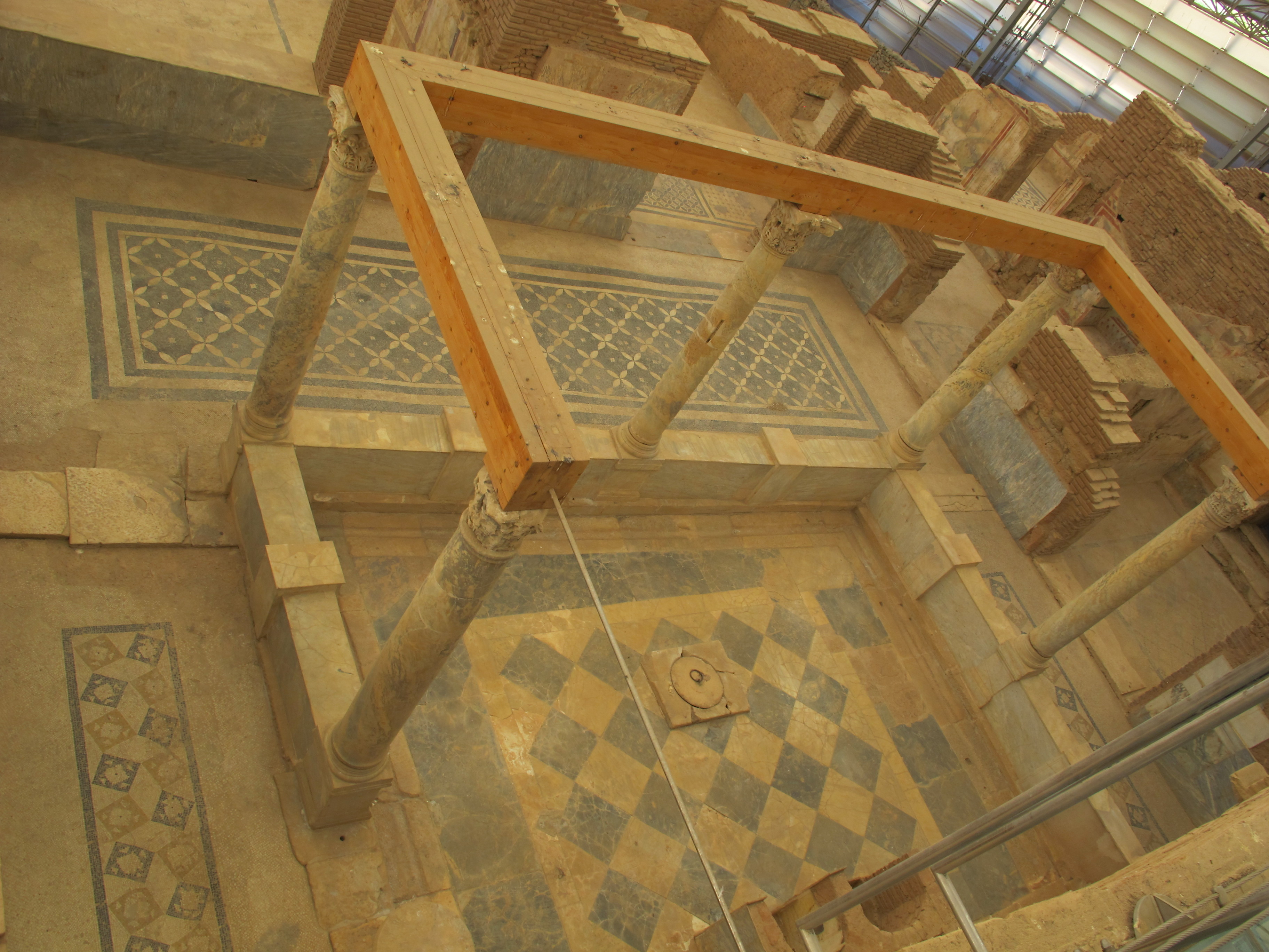 Efeso, case sulla collina